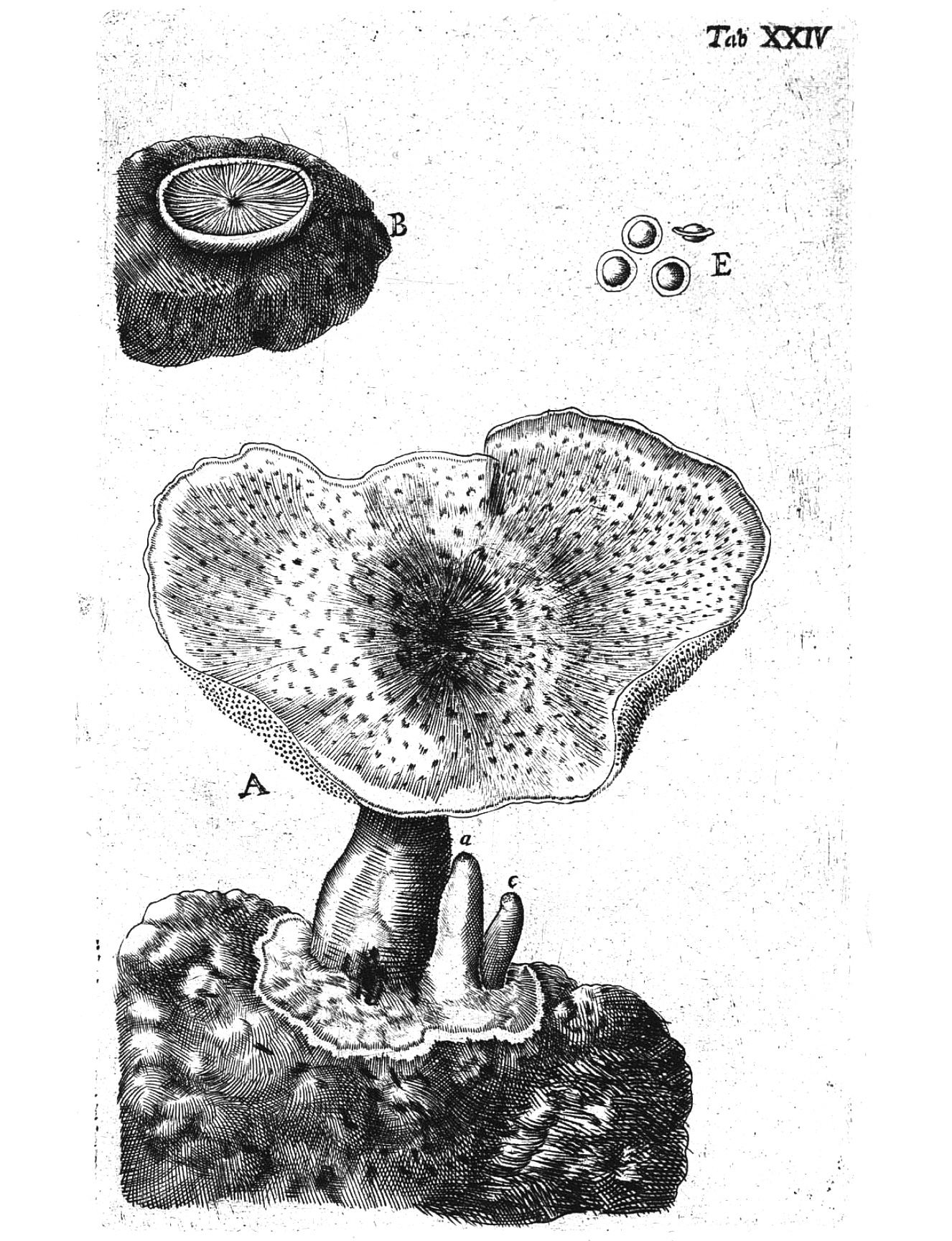 G. Battarra: "Fungorum agri Ariminensis historia" (1797), t. 24